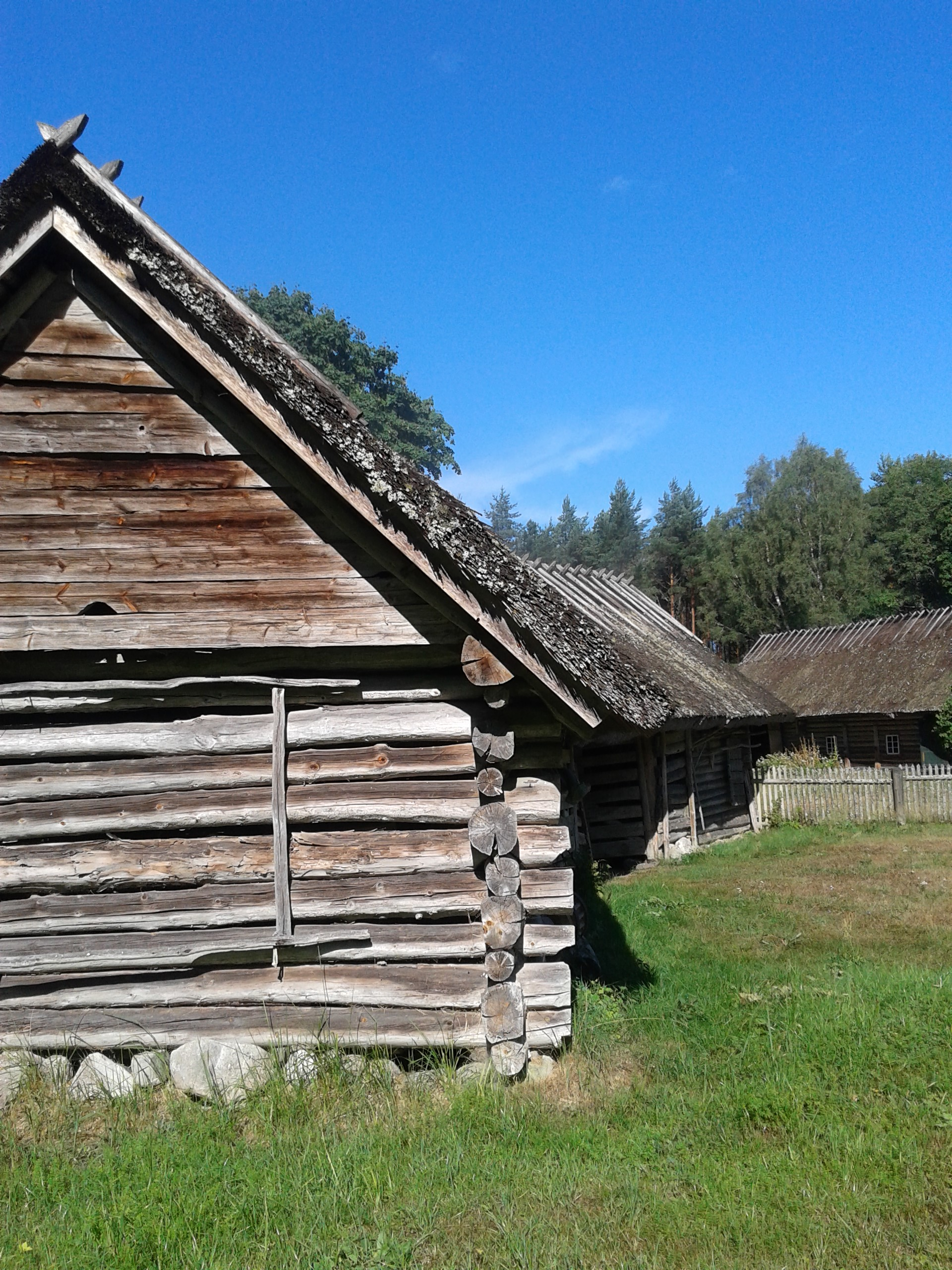 Mihkli talumuuseumi pöördusega ehk kõverait.